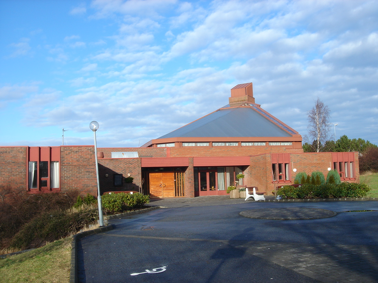 Madlamark Church/Madlamark kirke